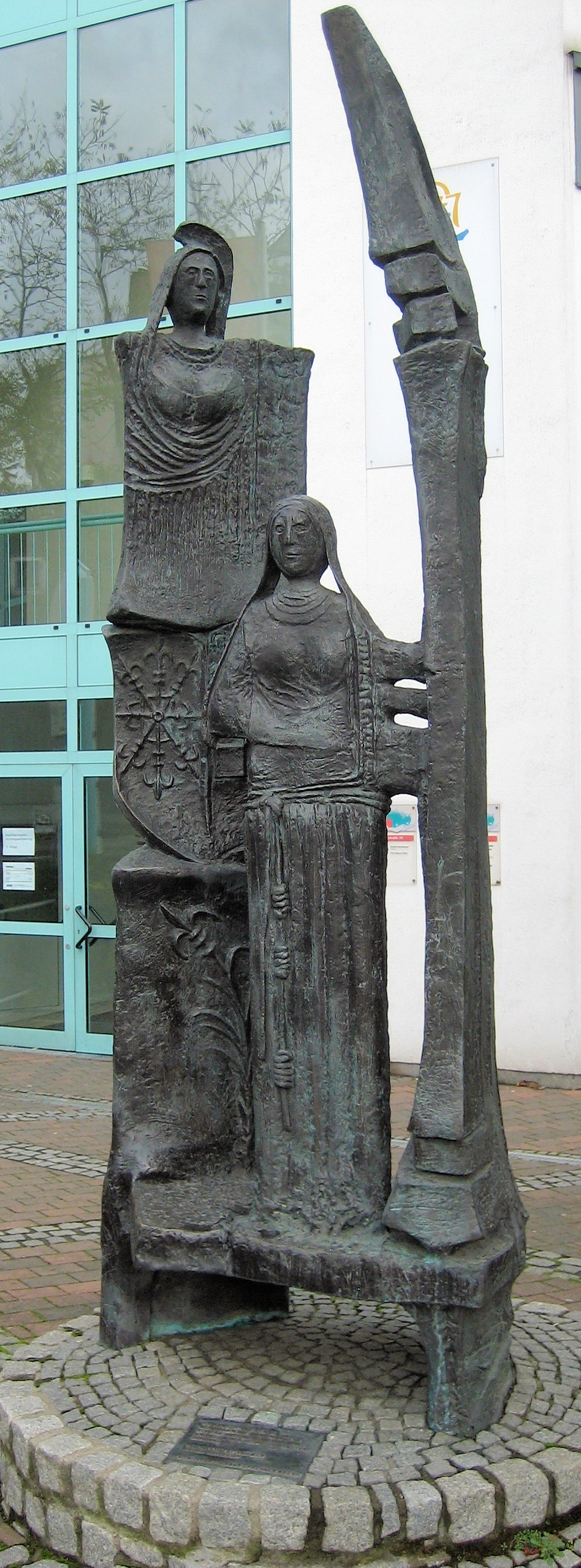 Denkmal Elisabeth von Kleve in Dortmund-Hörde